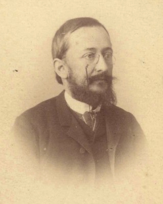 Retrato fotográfico de Francisco Fernández Iparraguirre